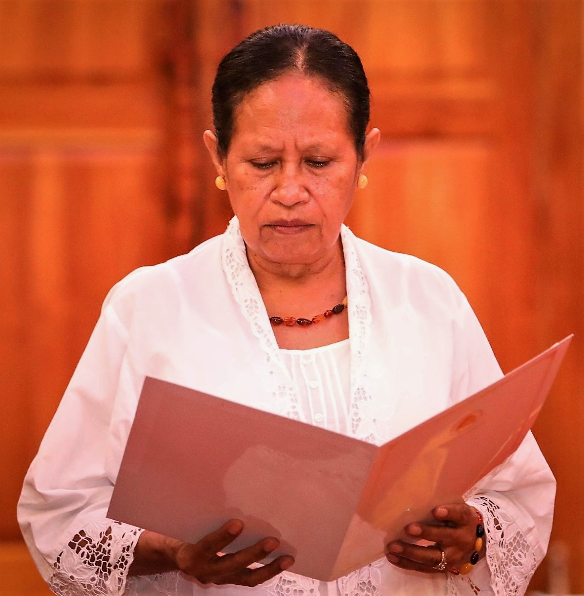 Botschafterin Isabel Guterres bei der Vereidigung